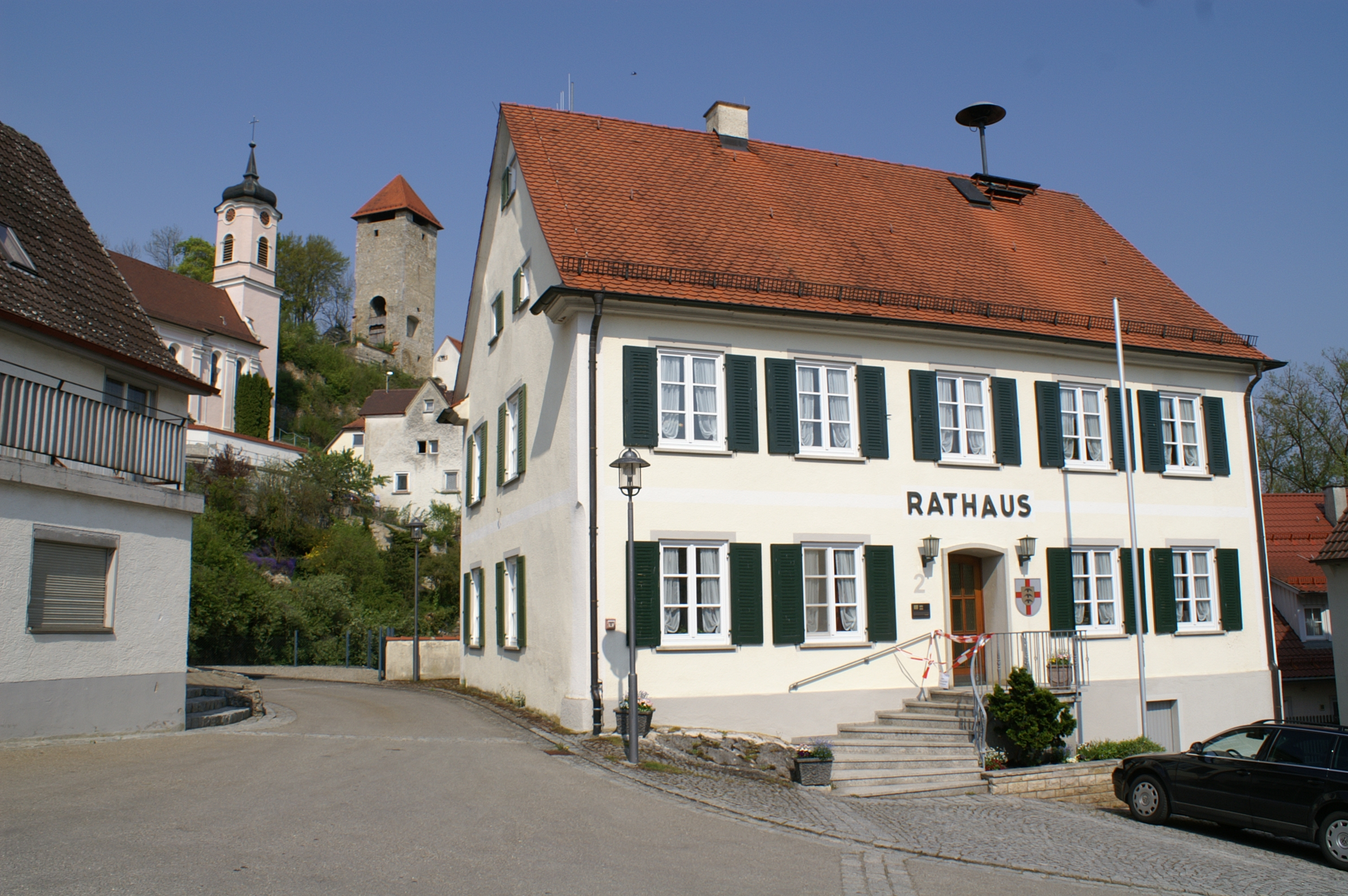 Rechtenstein im Alb-Donau-Kreis; Baden-Württemberg